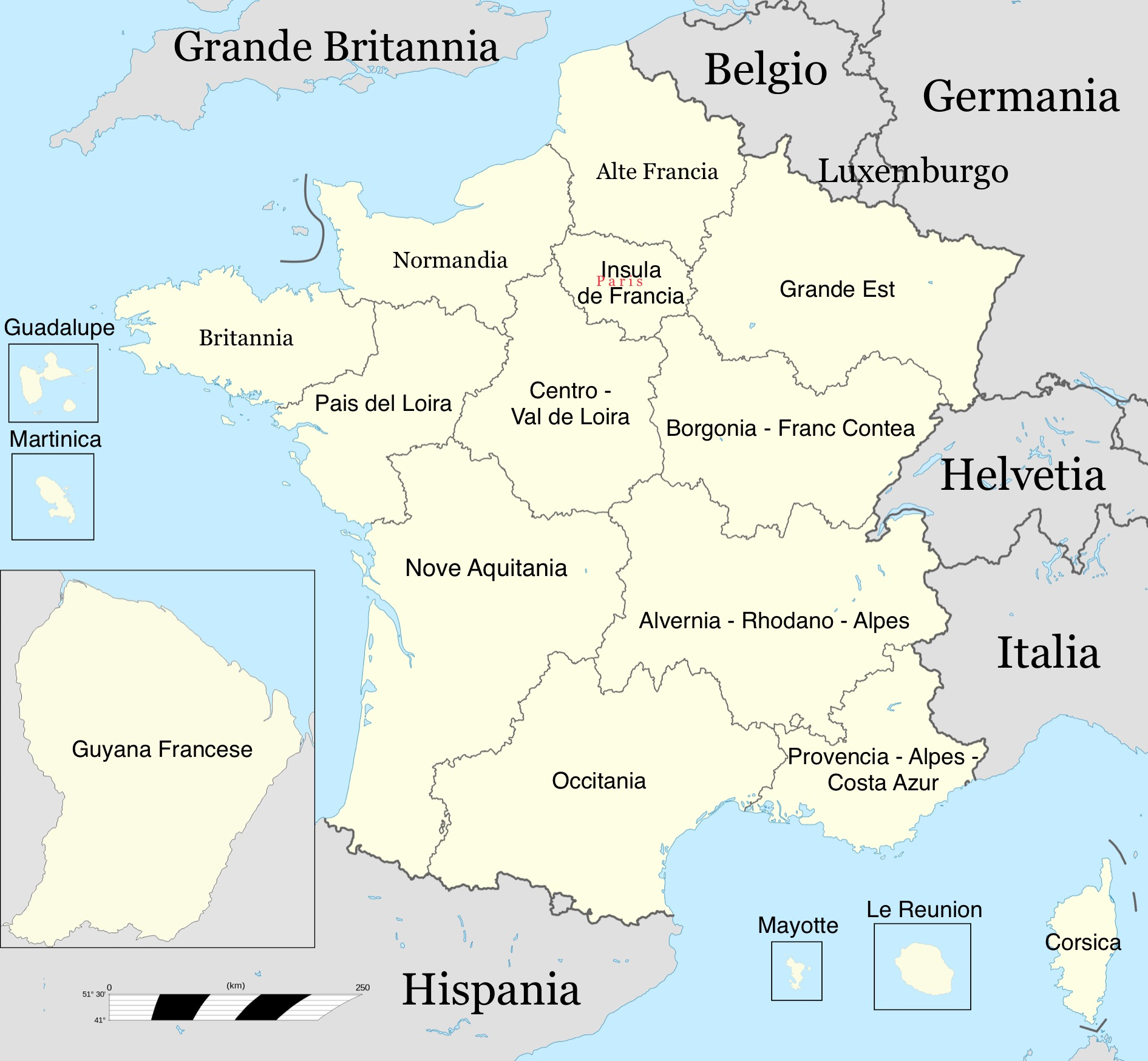 Interlingua: Carta del regiones de Francia in interlingua.